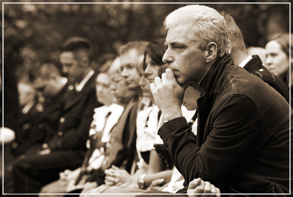 Zeno von Braitenberg